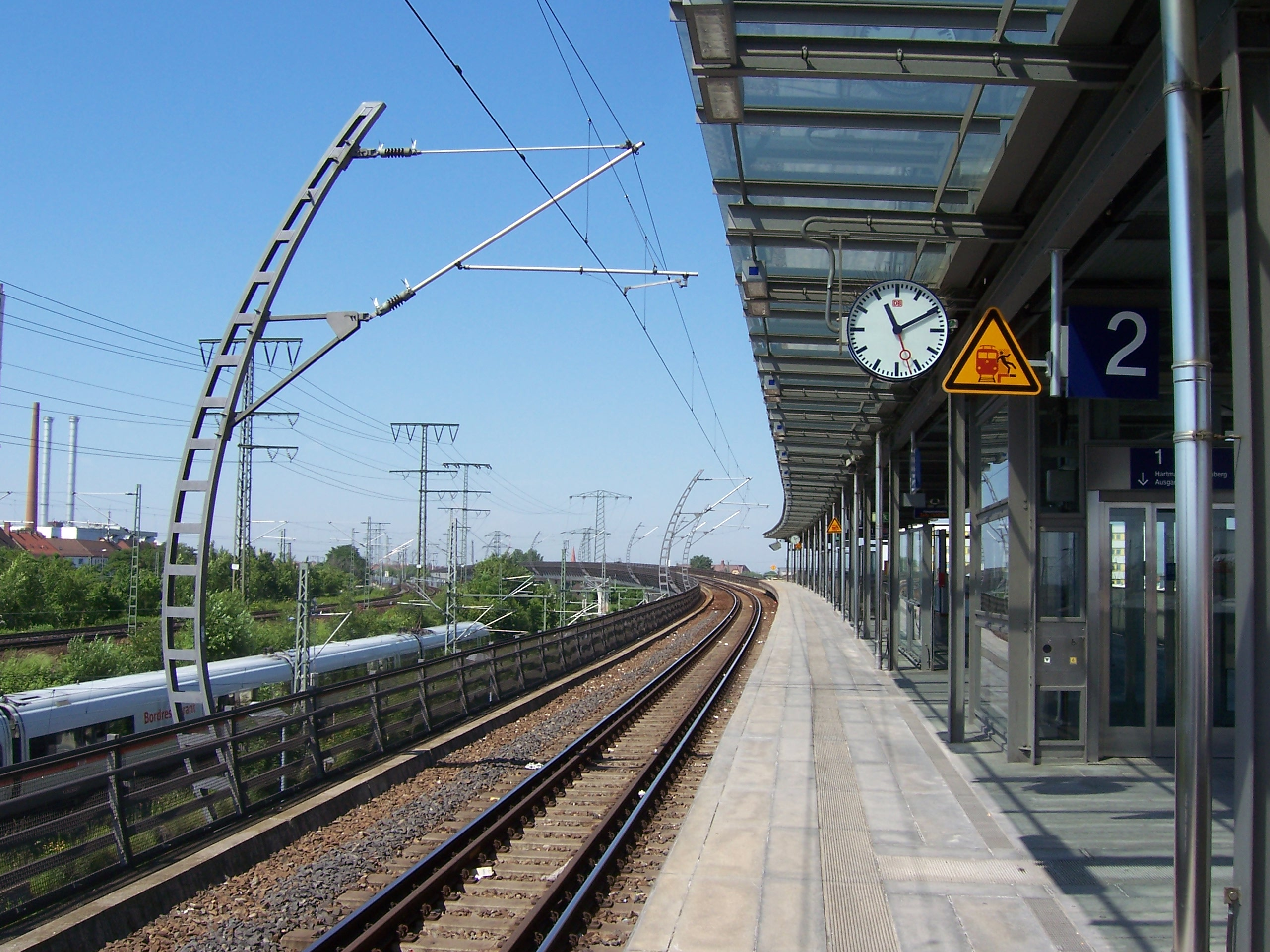 Bahnhof Nürnberg Steinbühl oben